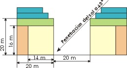 Evolución de la altura de los edificios Dibujo realizado por Josemanuel